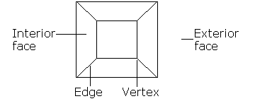 רשת של קודקודים, ישרים ופנים.